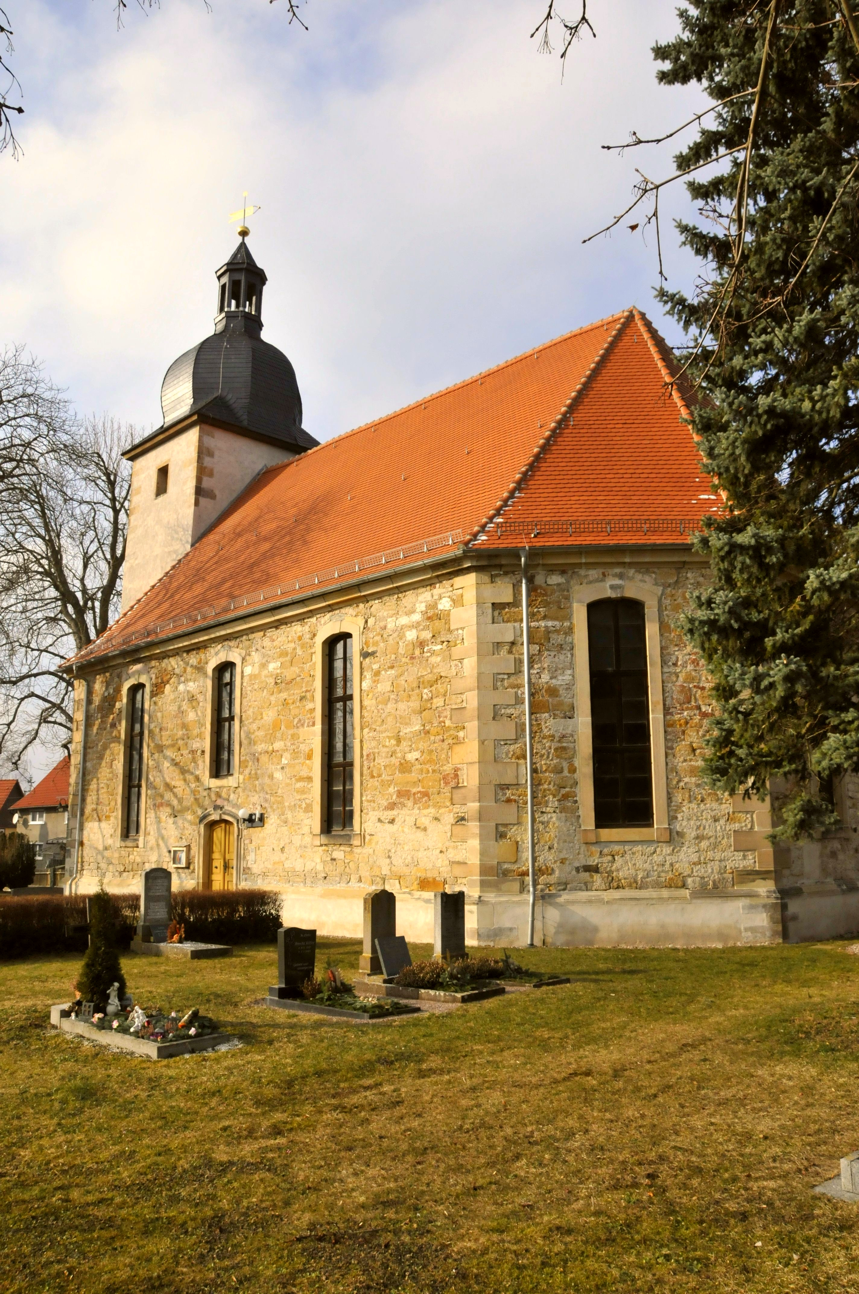 Kleinrettbach, Kirche, mit verputztem Turm